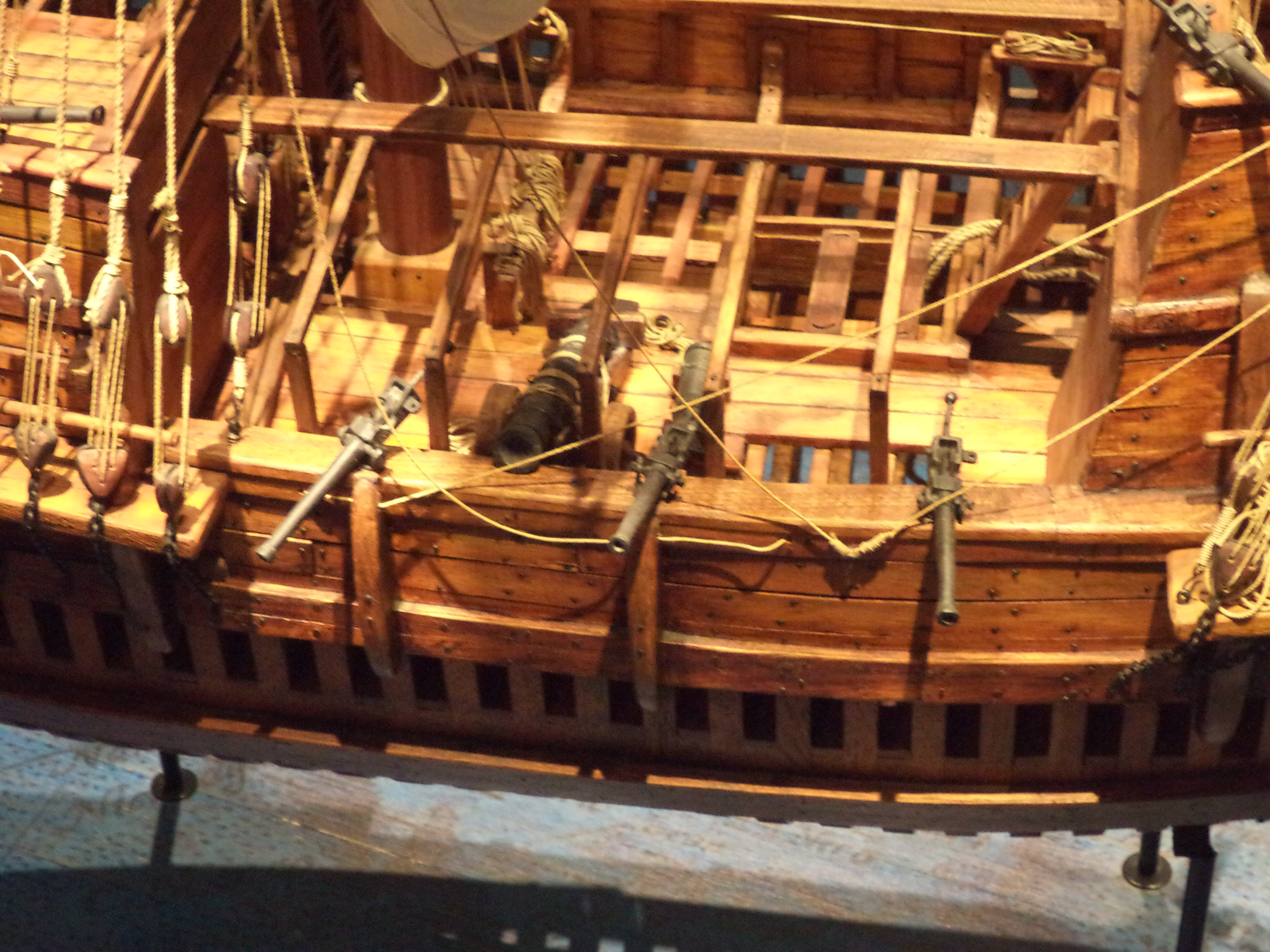 Tres falconetes y un cañón en el costado de un barco español. Maqueta.